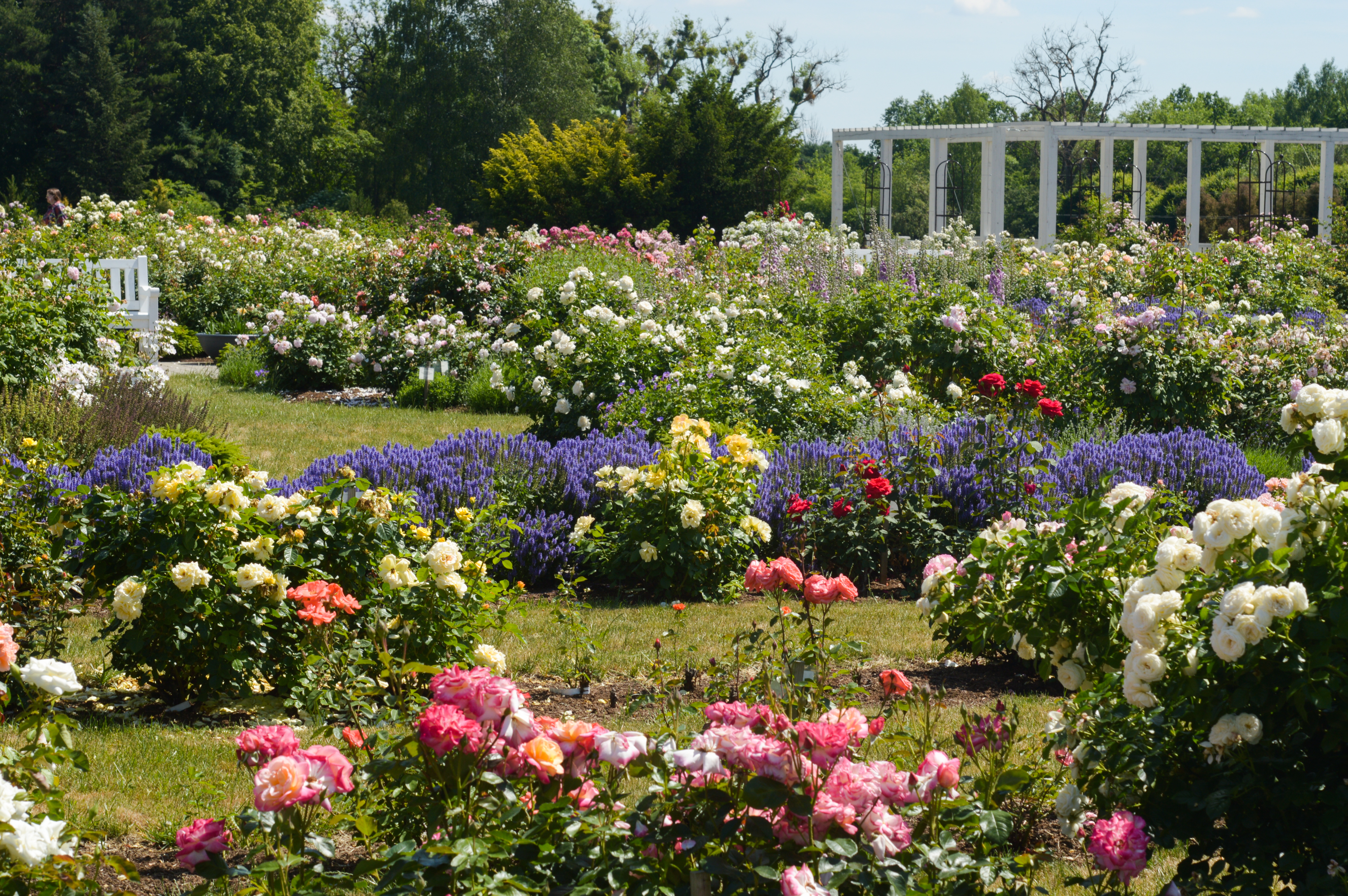 Rožynas, VDU Botanikos sodas, 2019 m. Rosegarden, VMU Botanical Garden in Kaunas, 2019